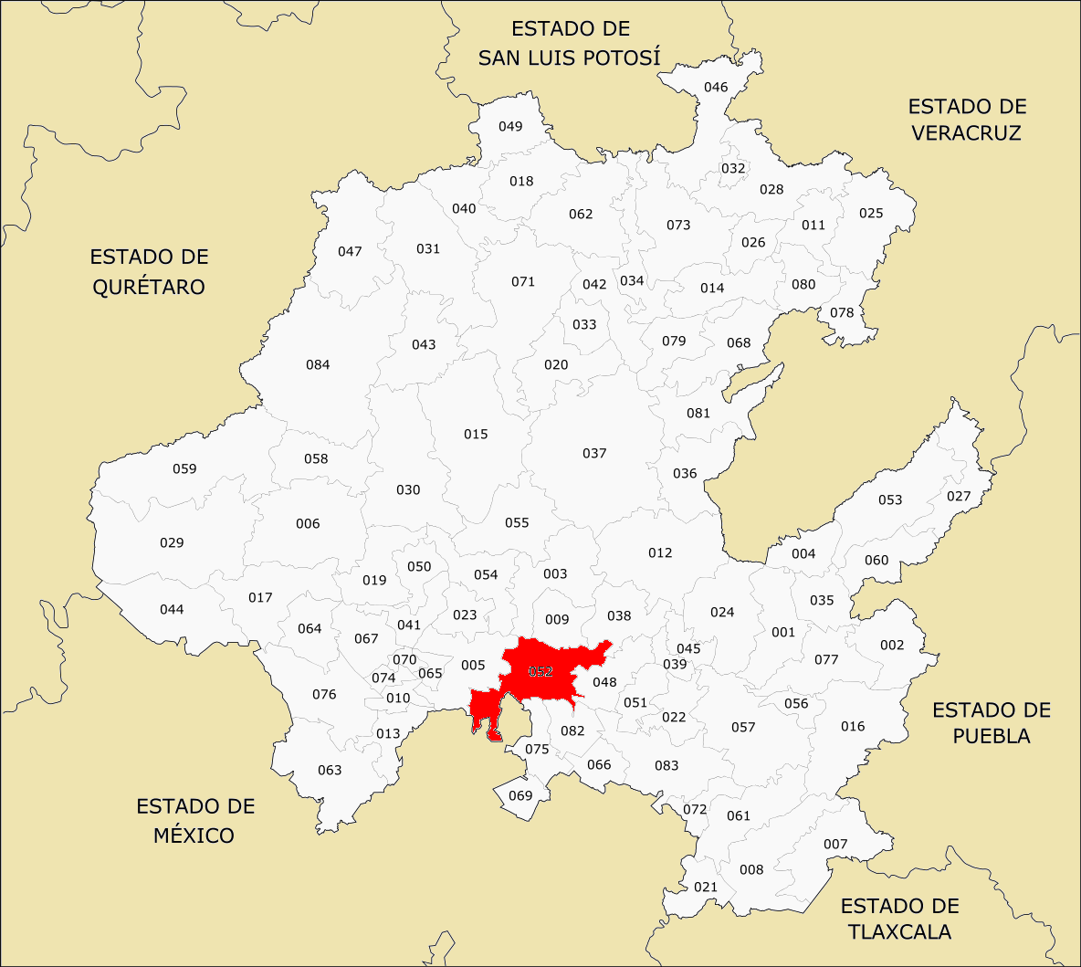 Municipio de Hidalgo